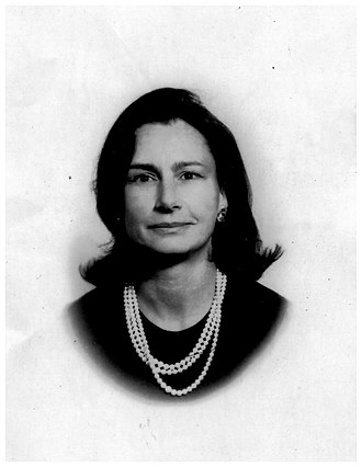 Marina Guardati